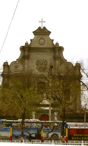 宣武门天主教堂 用心阁于2005年4月9日拍摄于宣武门